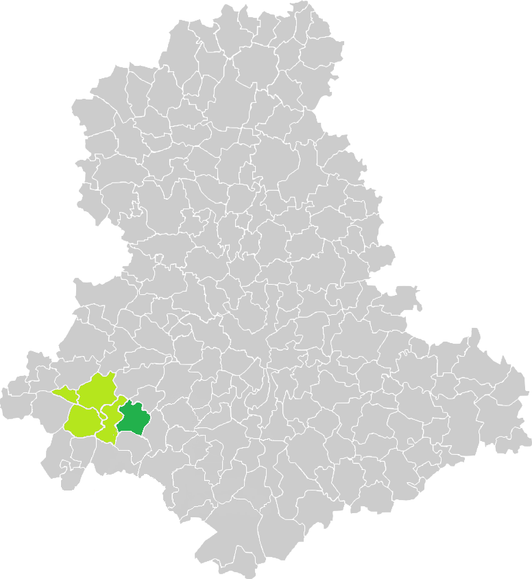 Carte de situation de la commune de Champsac (en vert foncé) dans le votre Canton (en vert clair) sur une carte des communes de la Haute-Vienne